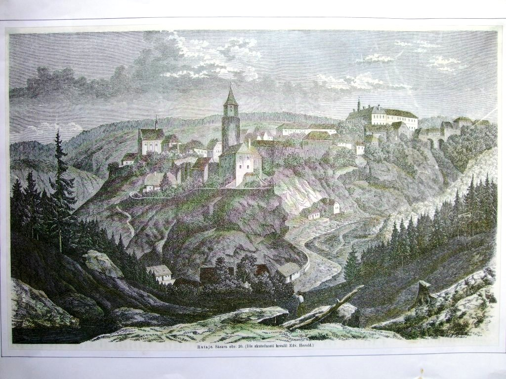 Městské hradby Rataje nad Sázavou dřive Hrazené Rataje od Eduarda Herolda